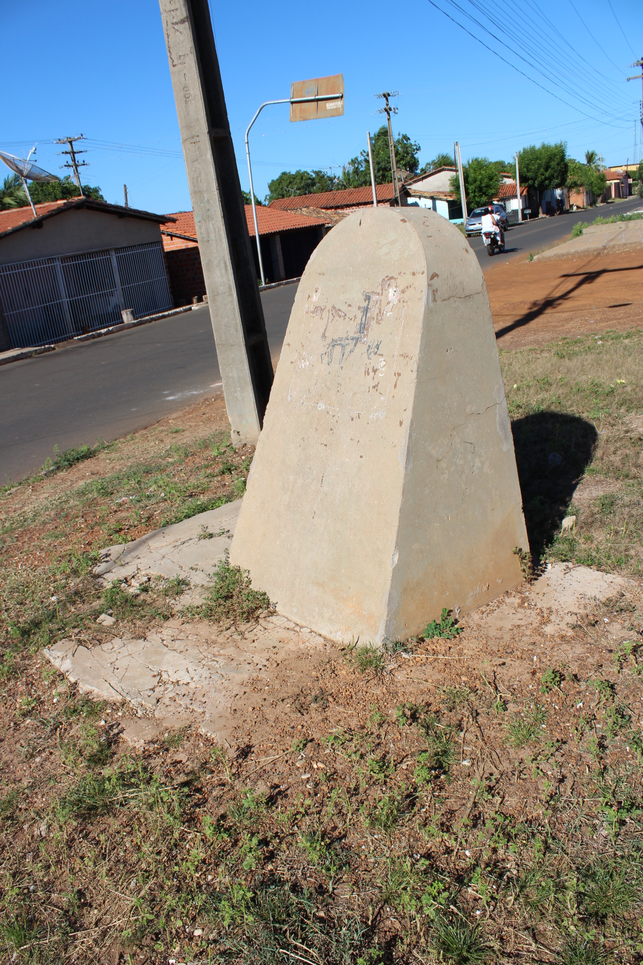 Antigo marco do DNOCS da obra de construção do aterramento, pontes e alargamentos da rodovia PI-215 em Campo Maior